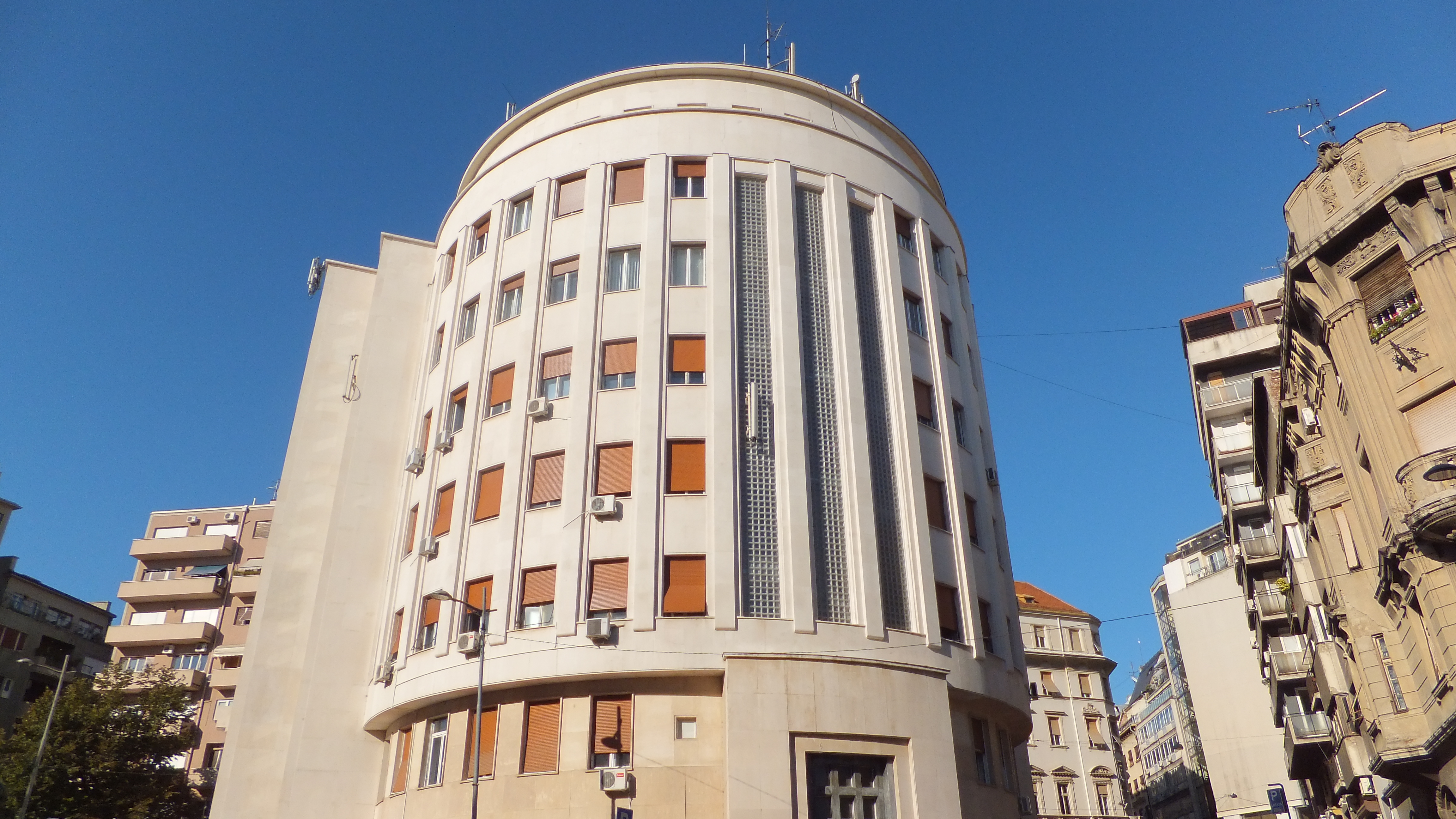 Зграда ПРИЗАД-а (ТАЊУГ)